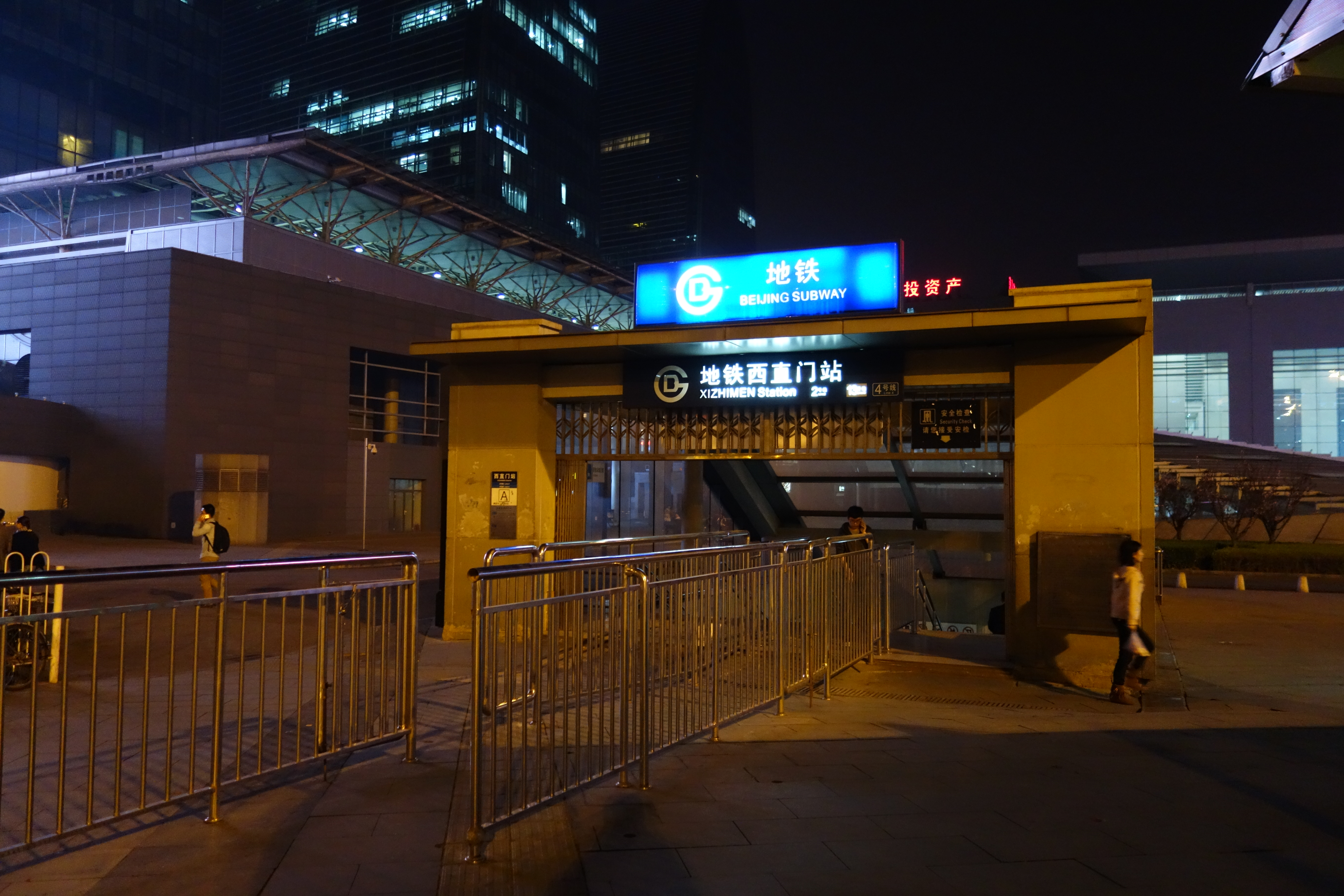 西直门站A口